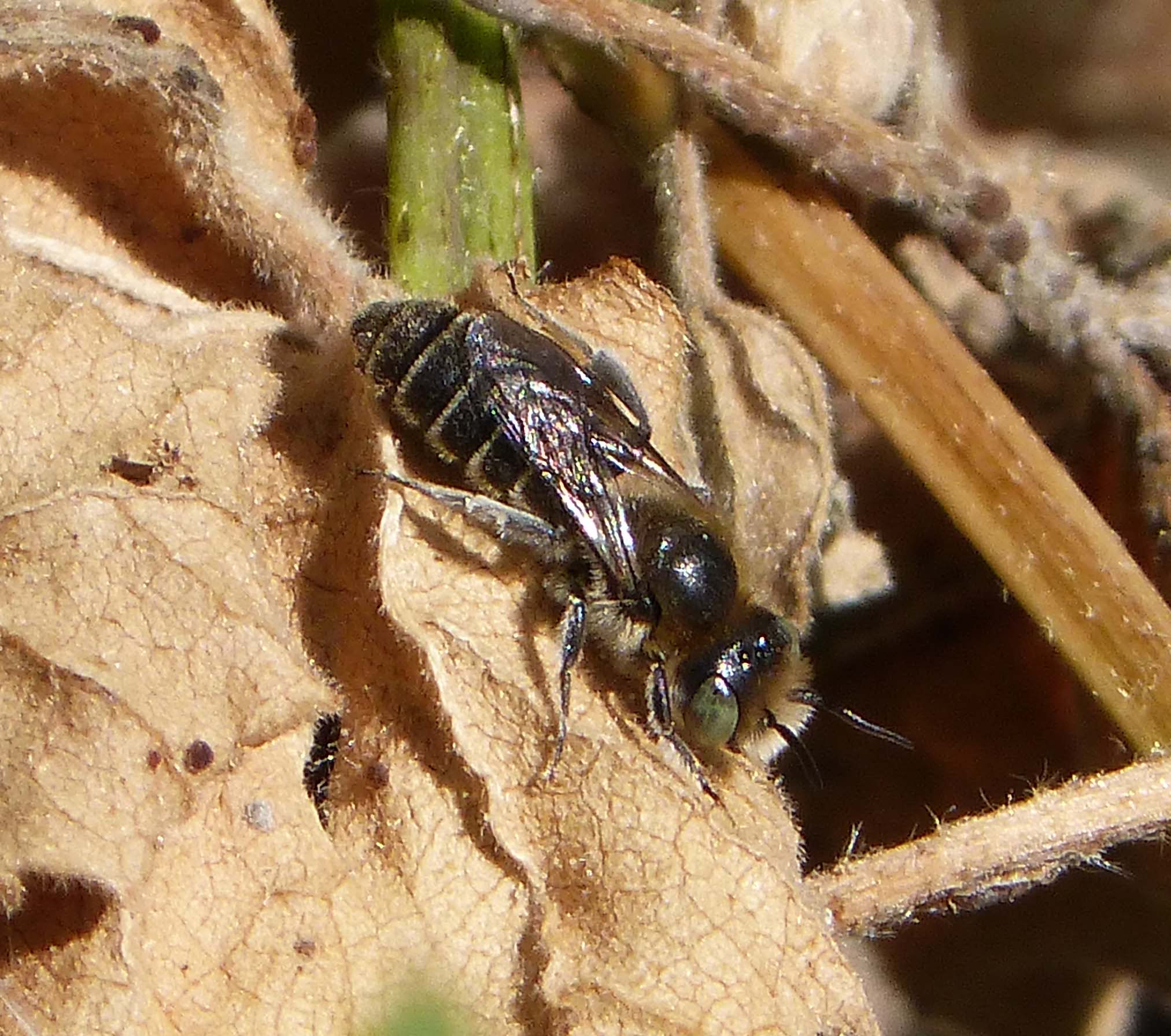 Jimena, Andalucia, Spain